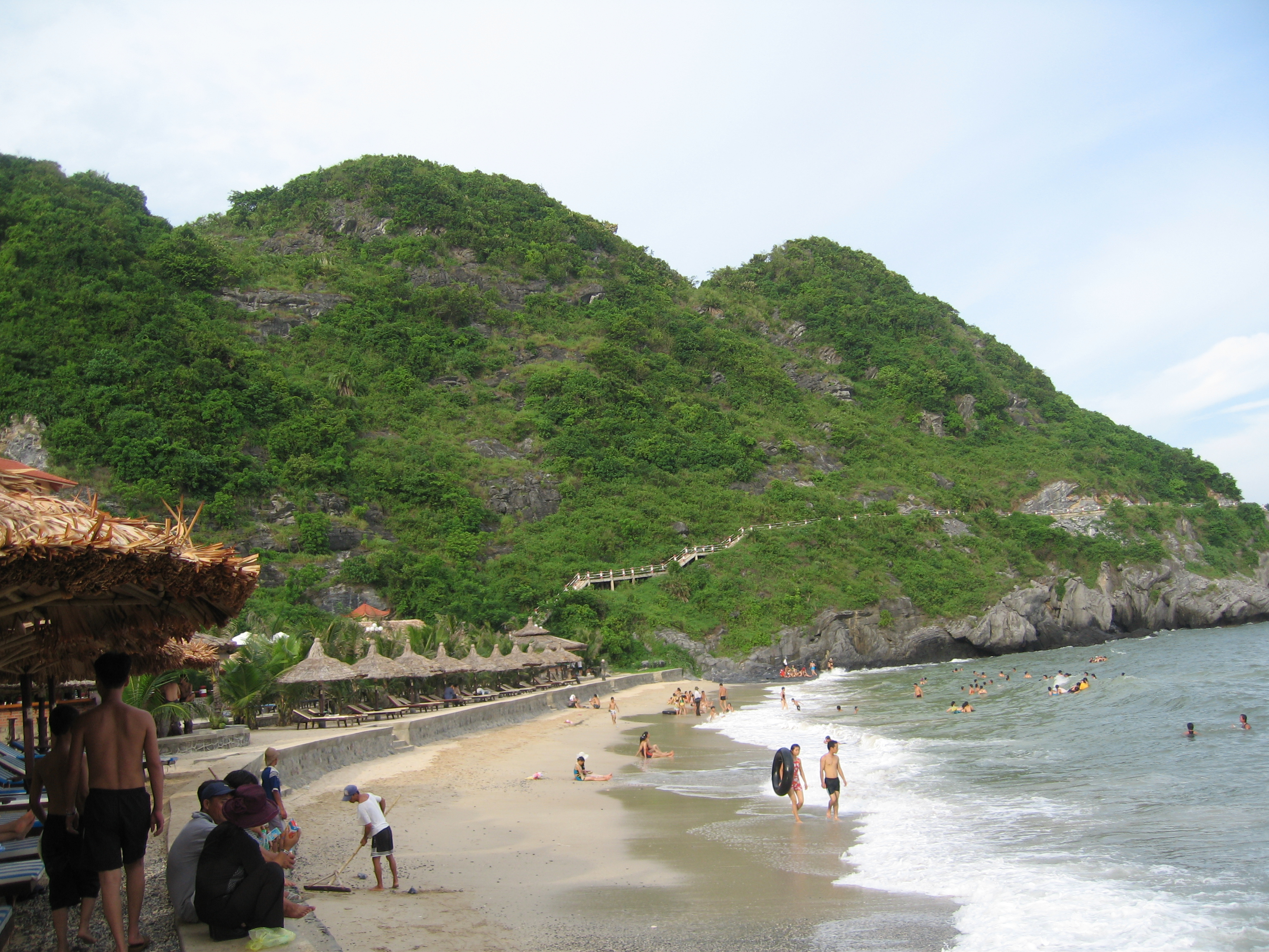 Hình tự chụp bởi Casablanca1911